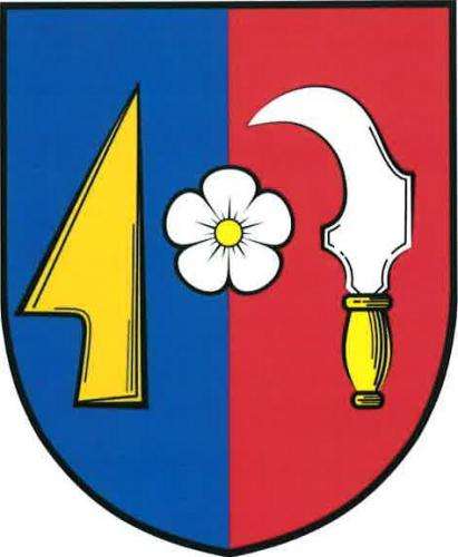 znak, Silůvky, okres Brno-venkov